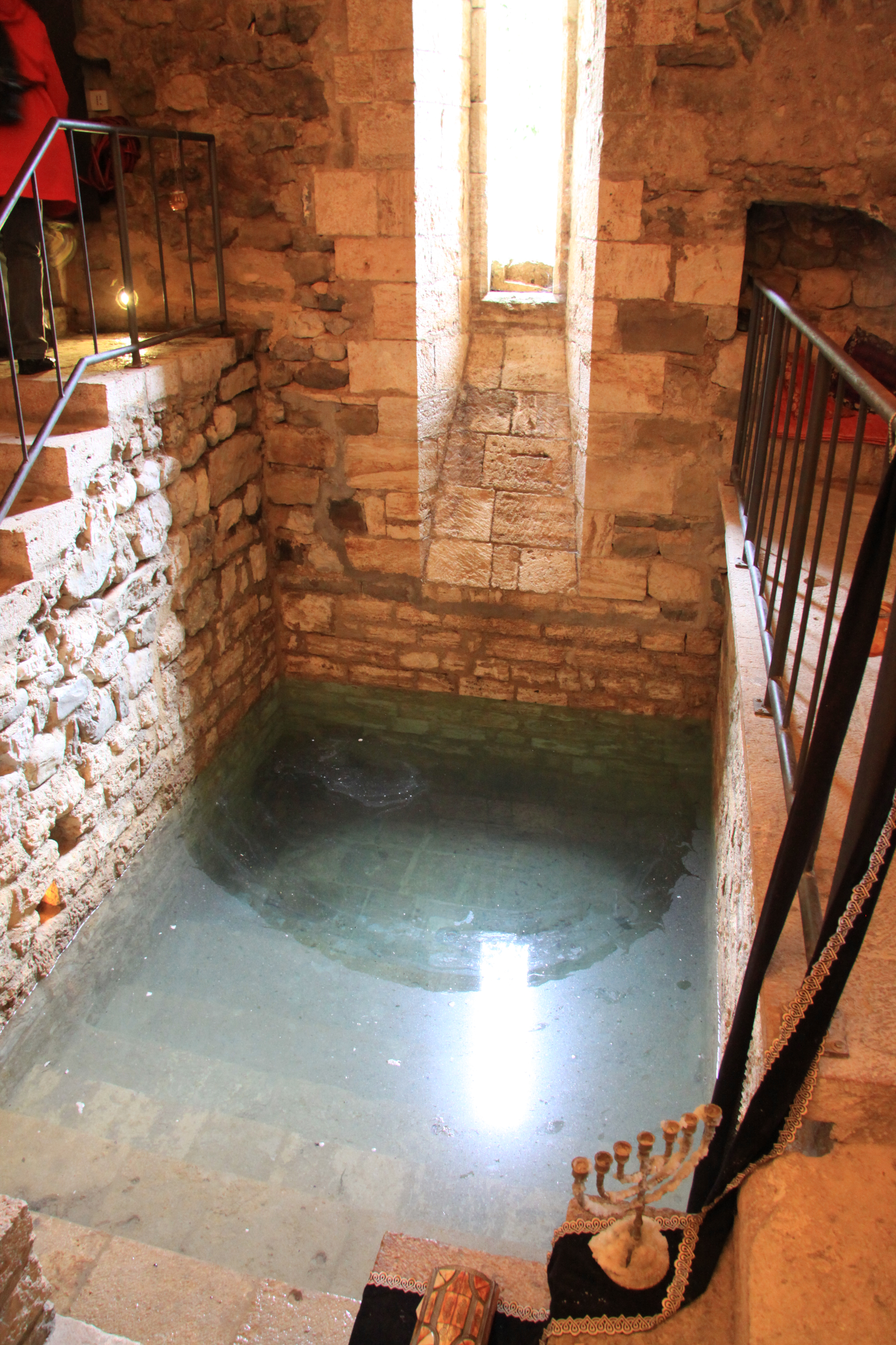 Interior del miqvé (bany jueu) de Besalú